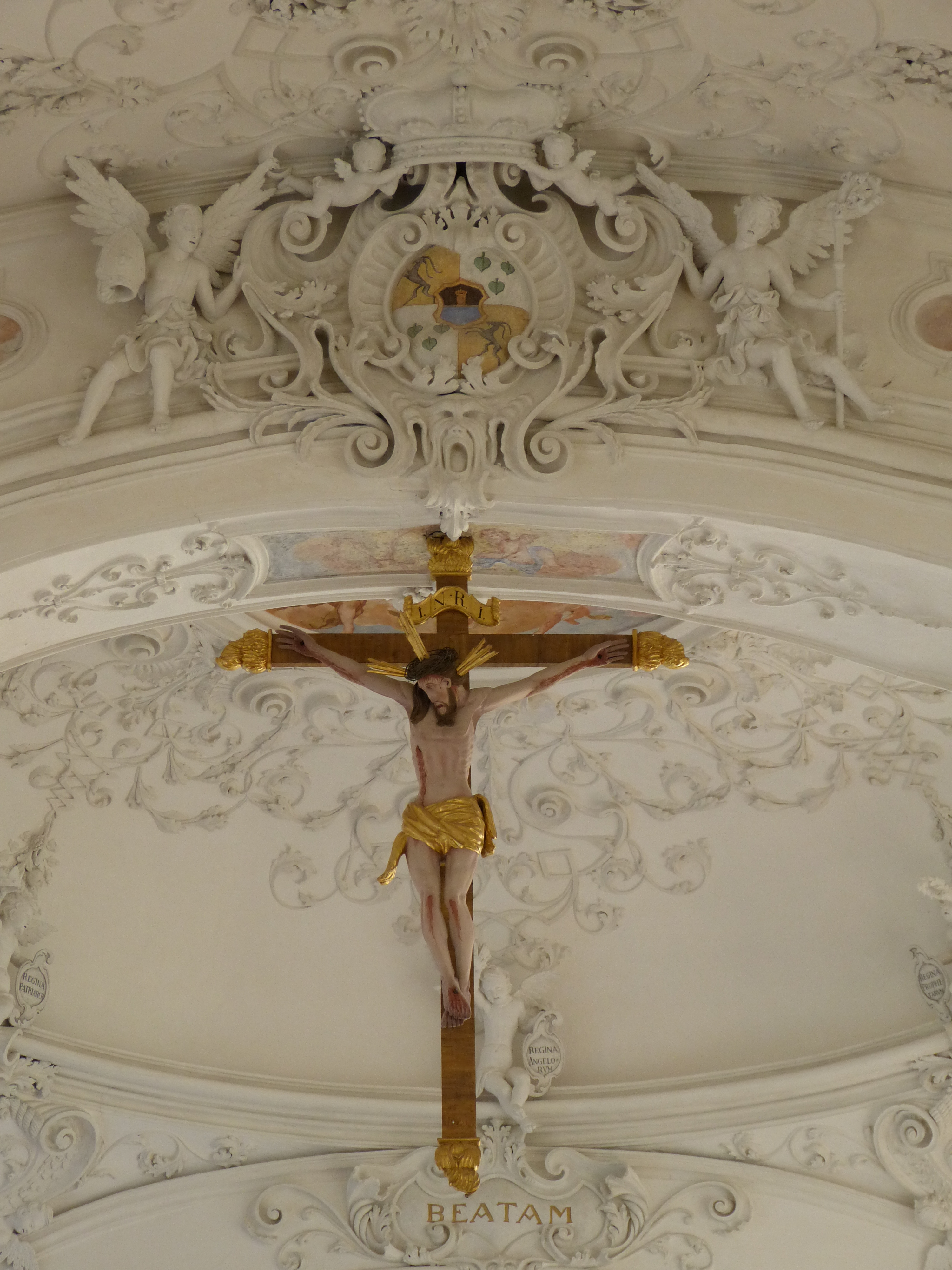 Wallfahrtskirche Maria Schnee, Legau, Landkreis Unterallgäu, Bayern